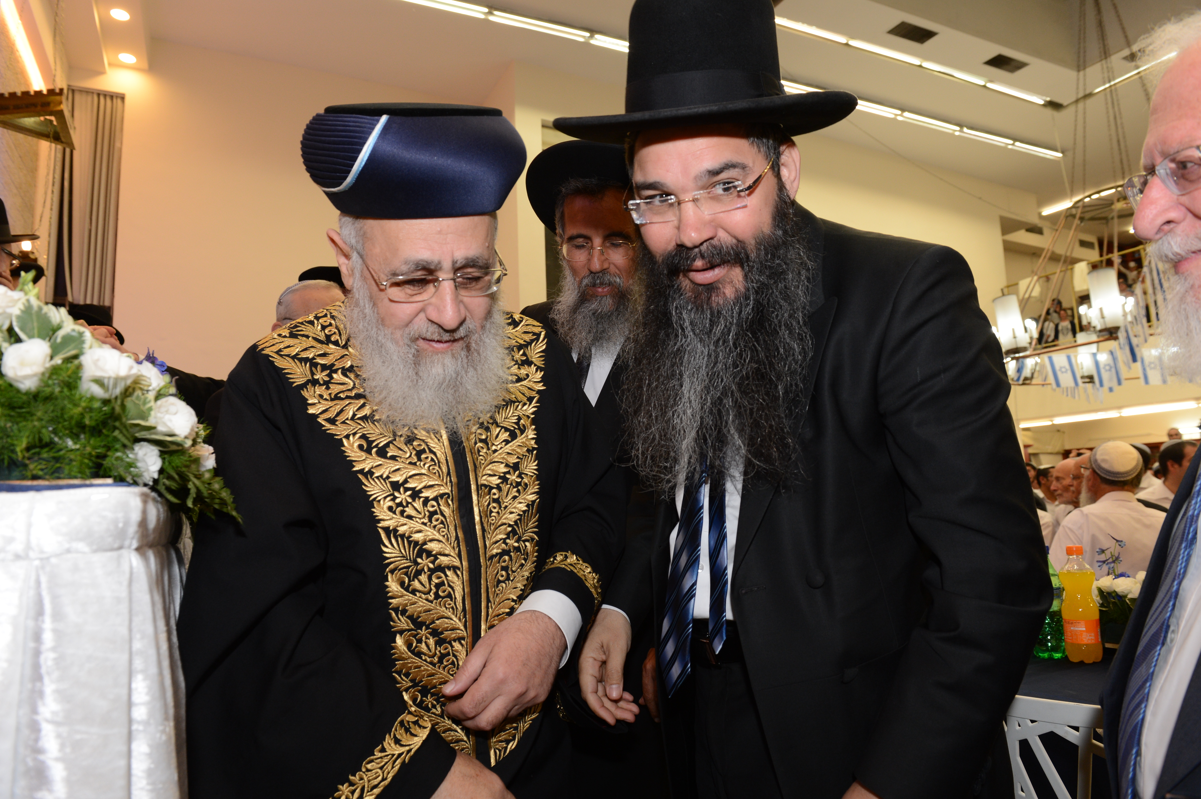 הרב משה אמסלם עם הרב יצחק יוסף במרכז הרב